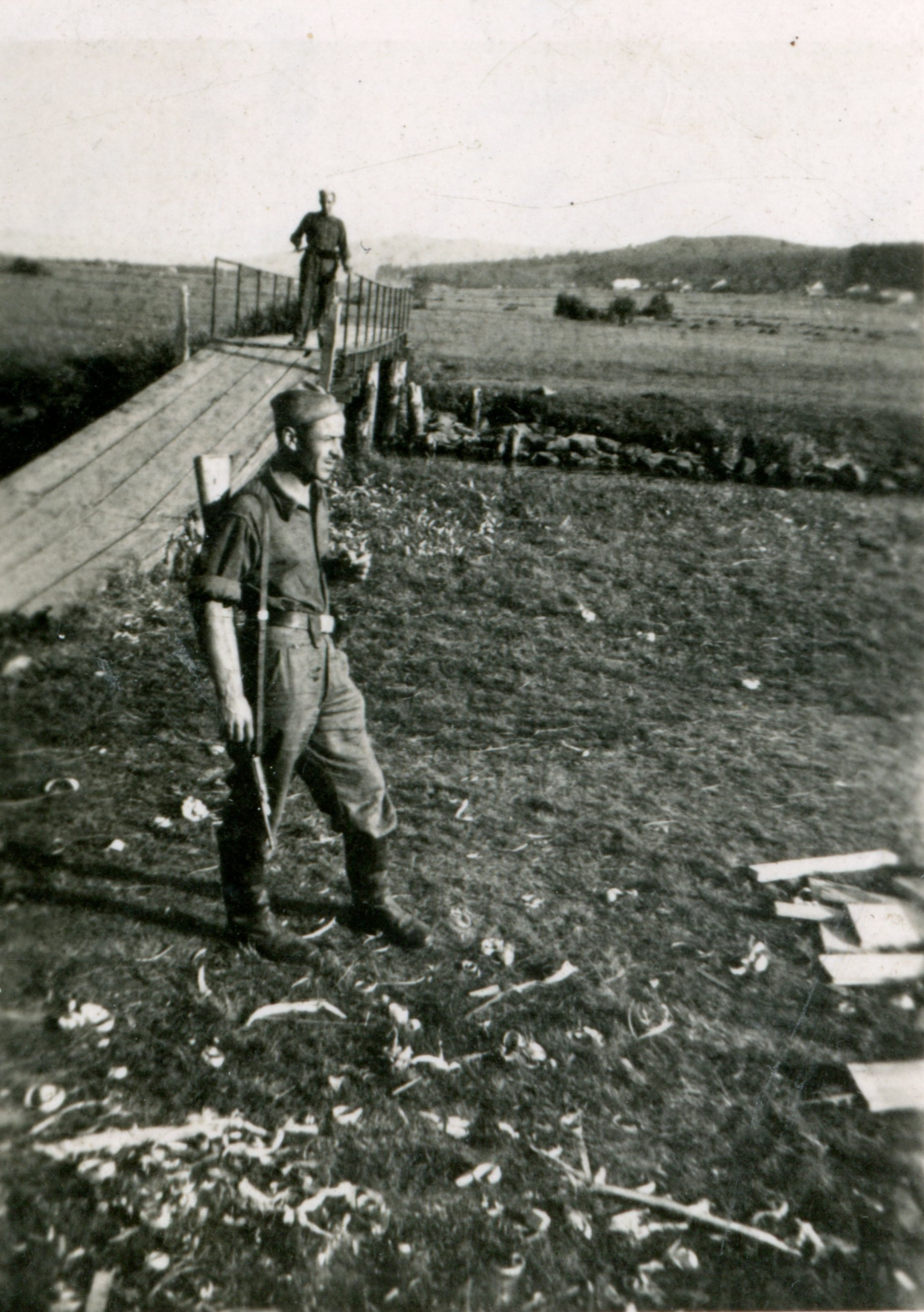 Dobrá, lávka přes Vltavu.